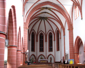 St.-Gallus-Kirche in Ladenburg.